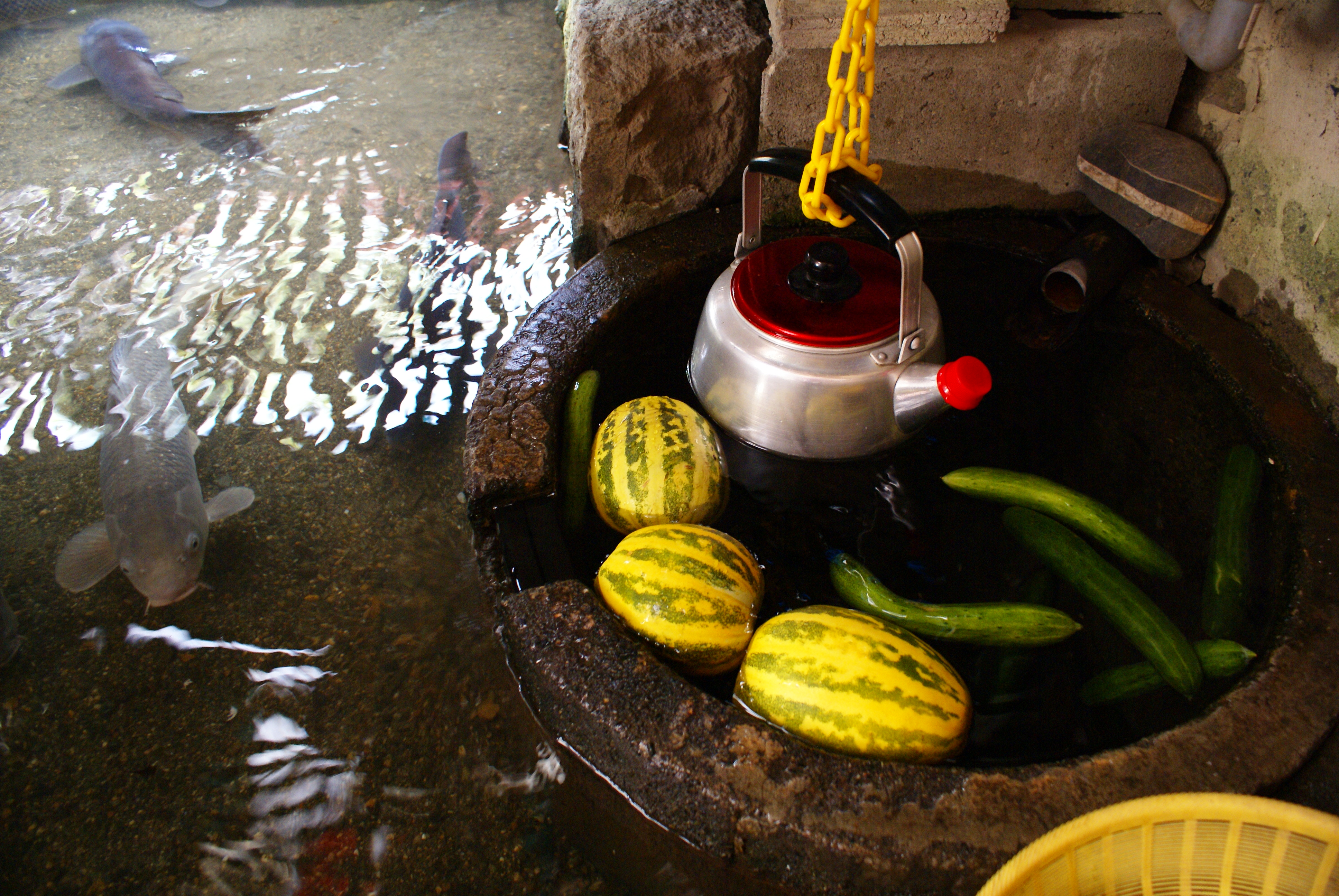 Kabata at Harie village, Takashima, Shiga, Japan